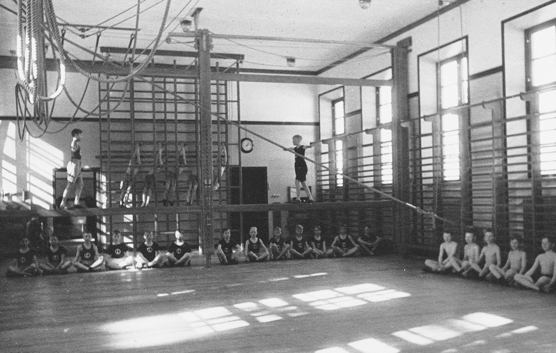 Skarpnäcks gamla skola, gymnastikflygeln, interiör